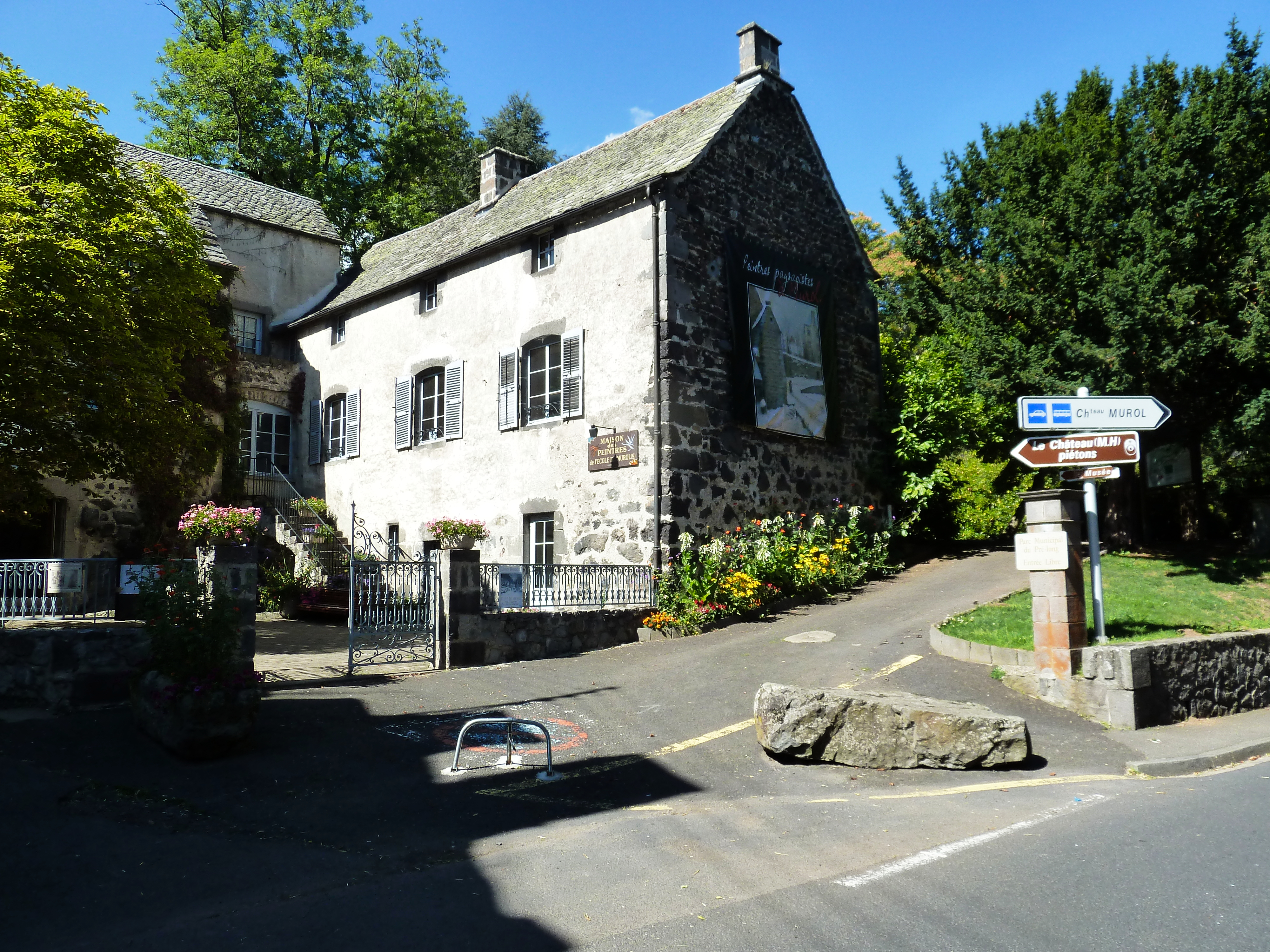 Le musée consacré aux peintres de l'École de Murol, Puy-de-Dôme.- (Auvergne).- France.